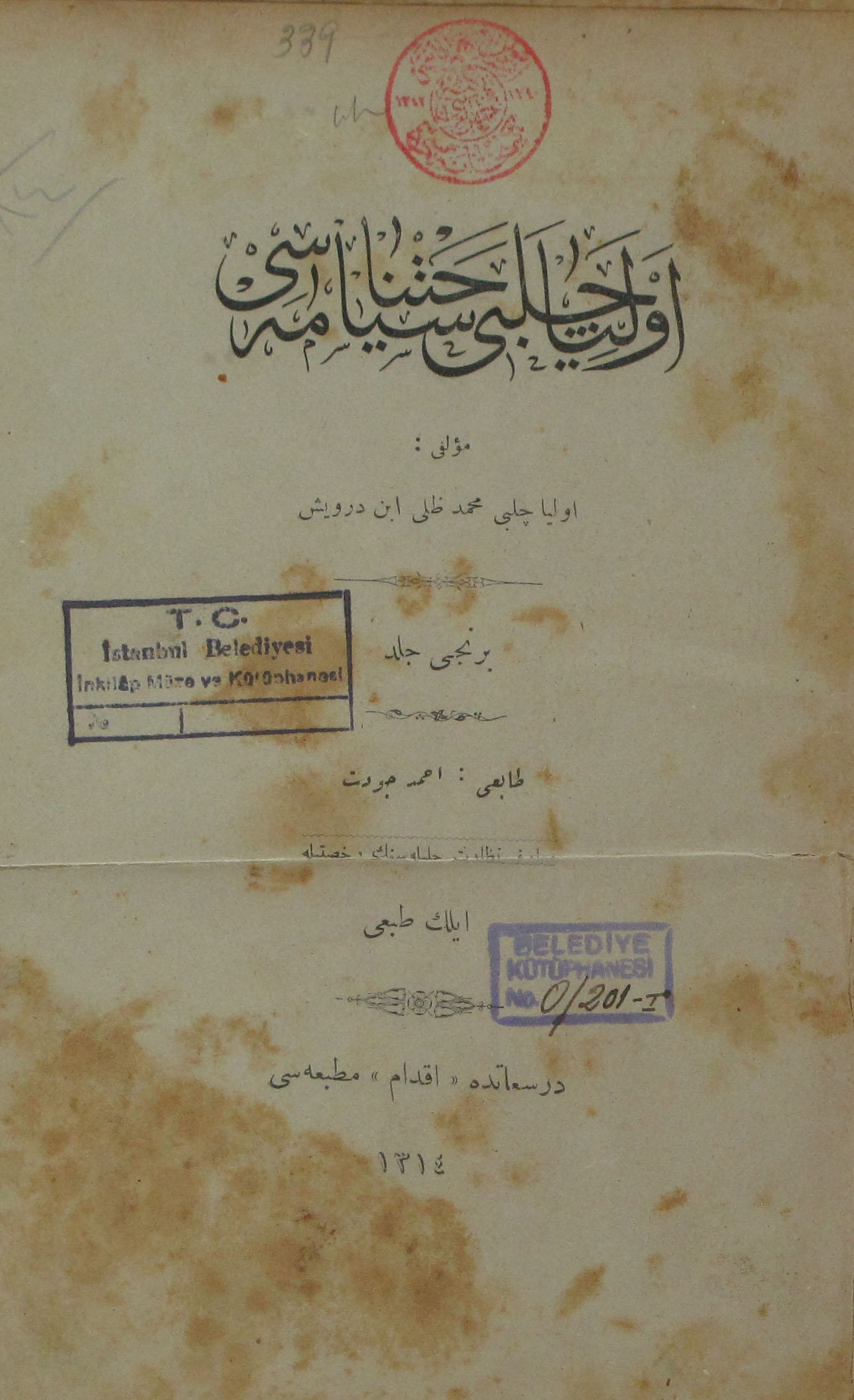 Evliya Çelebi seyahatnamesi (اوليا چلبى سياحتنامه سى] ) / Evliya Çelebi, Mehmed b. Zıllî ibn Derviş (اوليا چلبى، محمد بن ظلى ابن درويش) ; tab.: Ahmed Cevdet